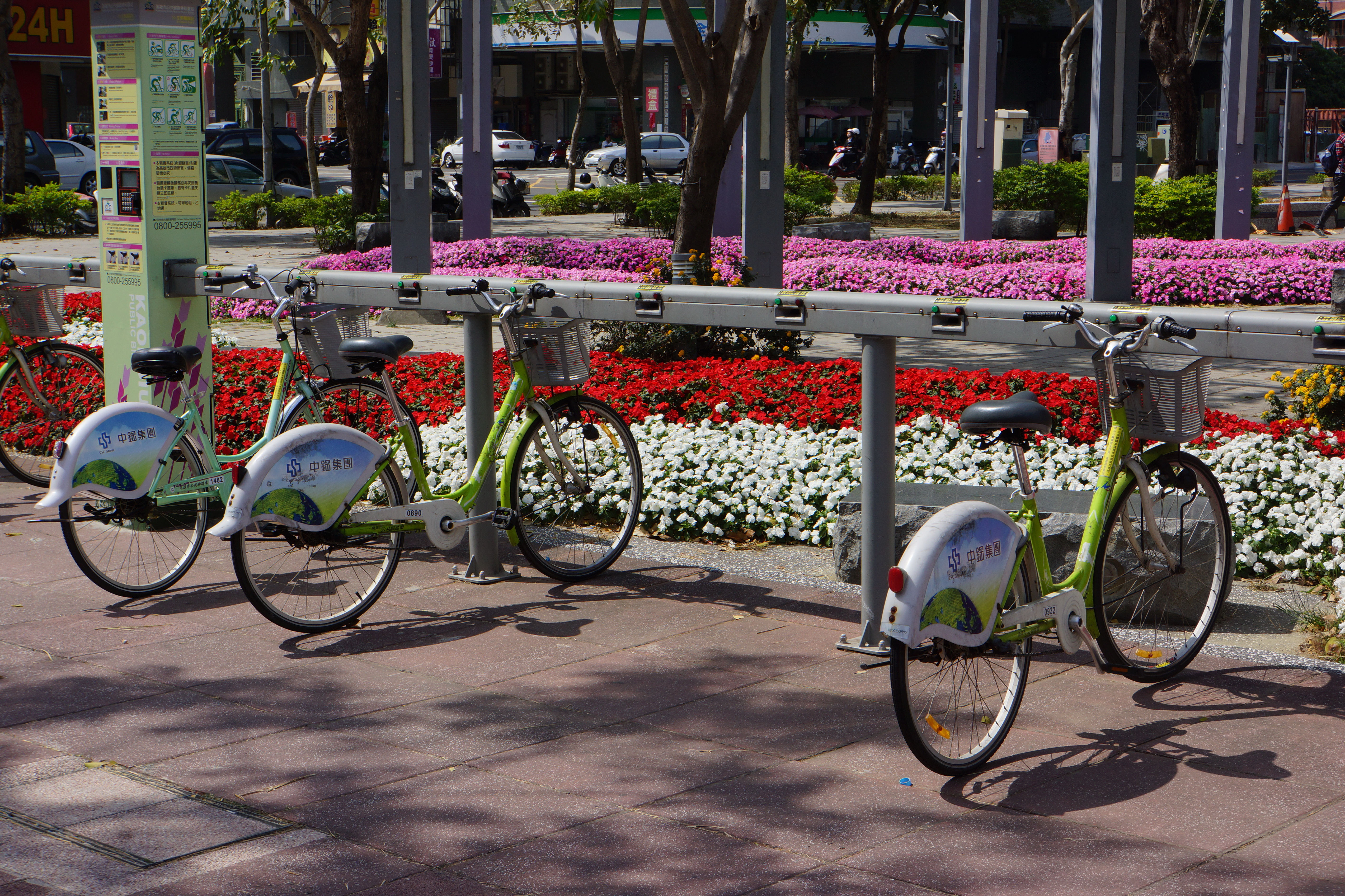 Gaoxiong Boai Park 高雄博愛公園